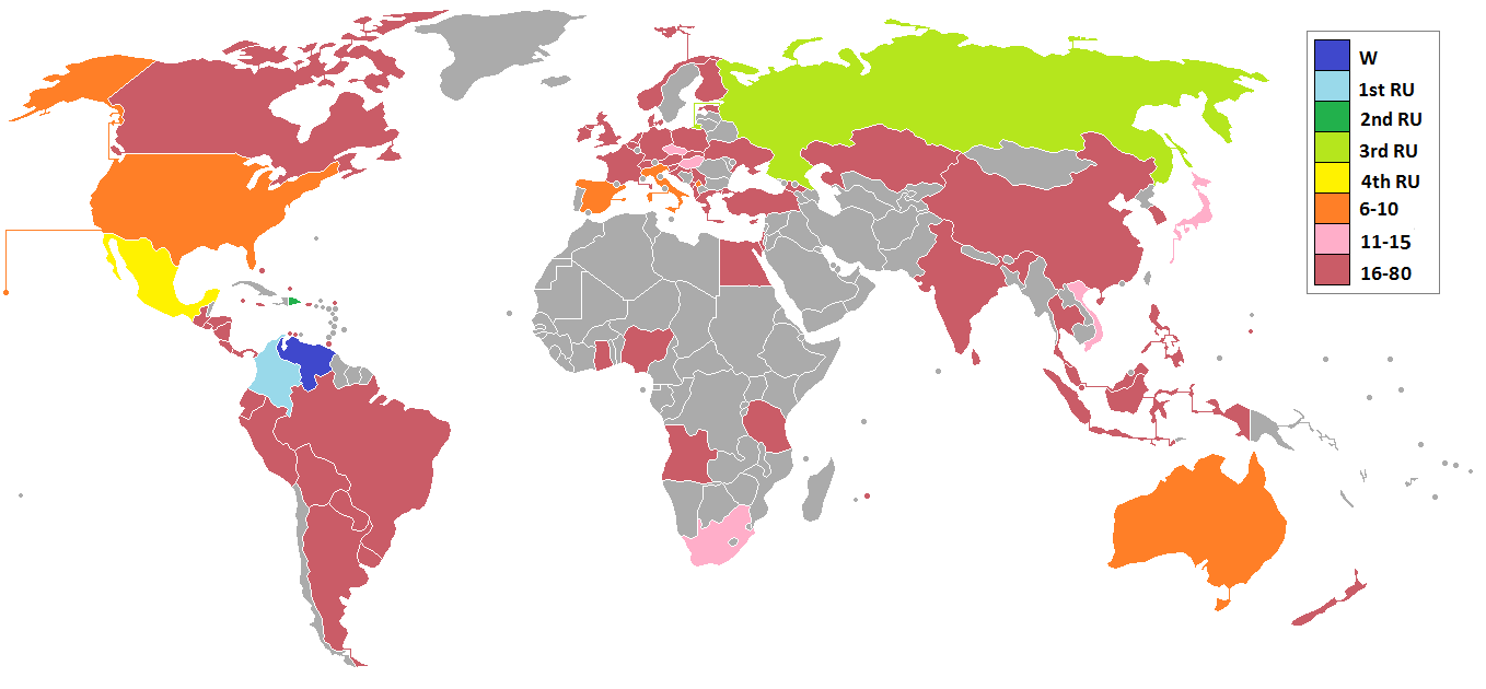 Mapa destacando a las naciones participantes en el certamen Miss Universo 2008 y sus posiciones finales. En español.